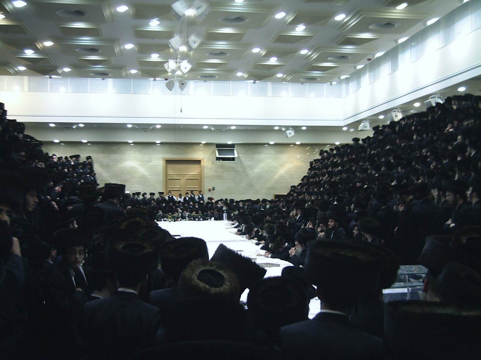 Belzer tish op Purim 5766. Zelf gemaakt.